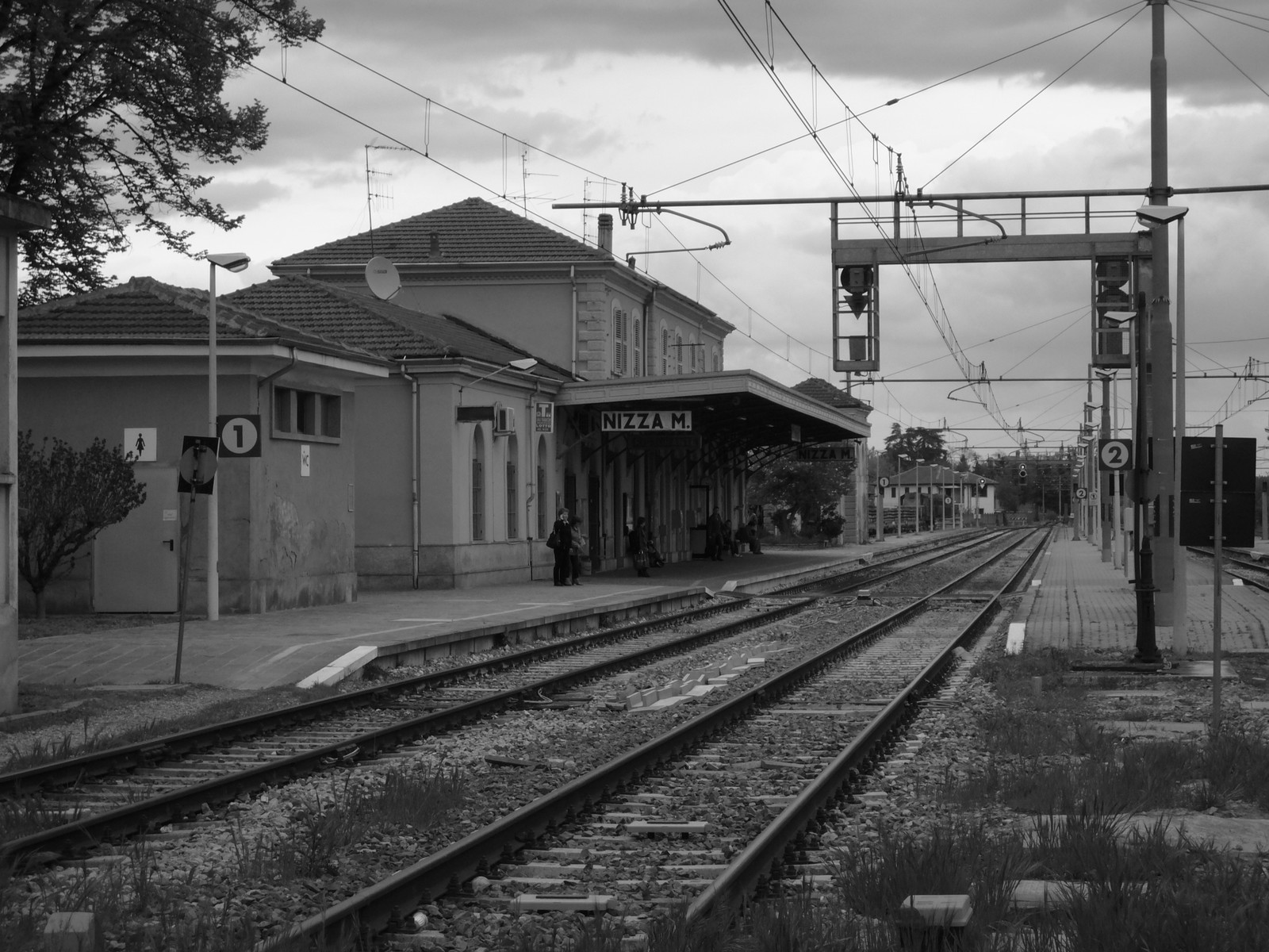 Stazione ferroviaria di Nizza Monferrato, Asti, Italia